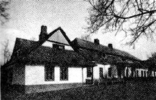 Беларуская (тарашкевіца): Малая Бераставіца (Małaja Bierastavica). Сядзіба